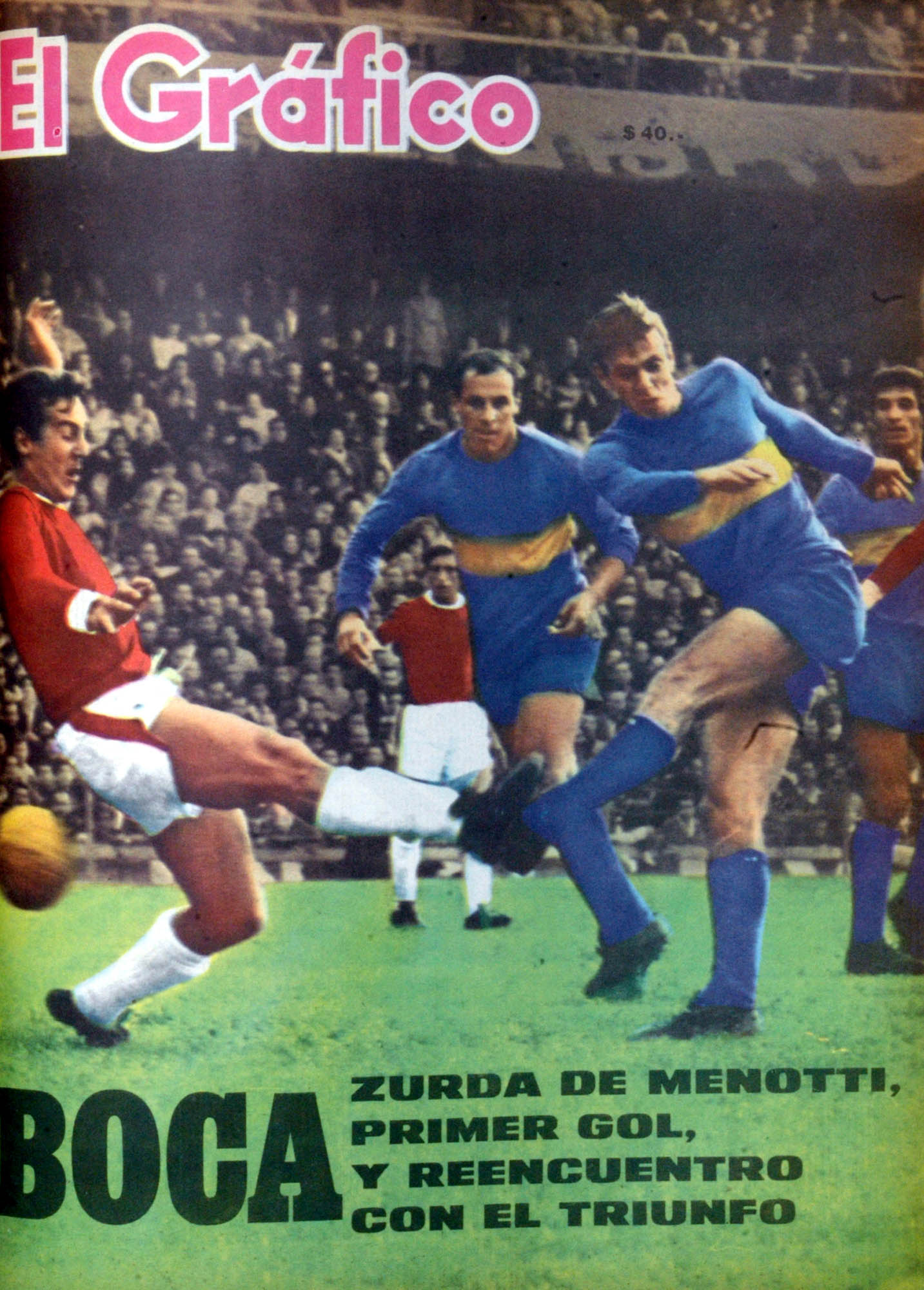 El Grafico del 31 de Mayo de 1966. Edicion 2434